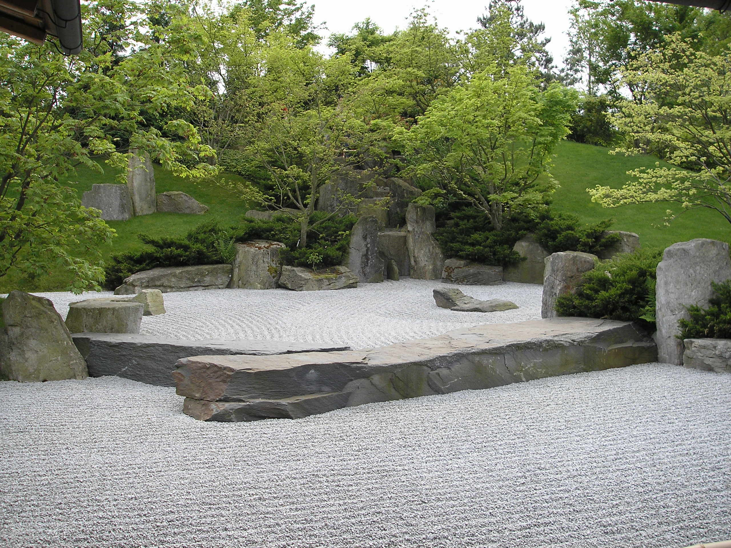 Japanese garden in Gärten der Welt, Berlin-Marzahn.